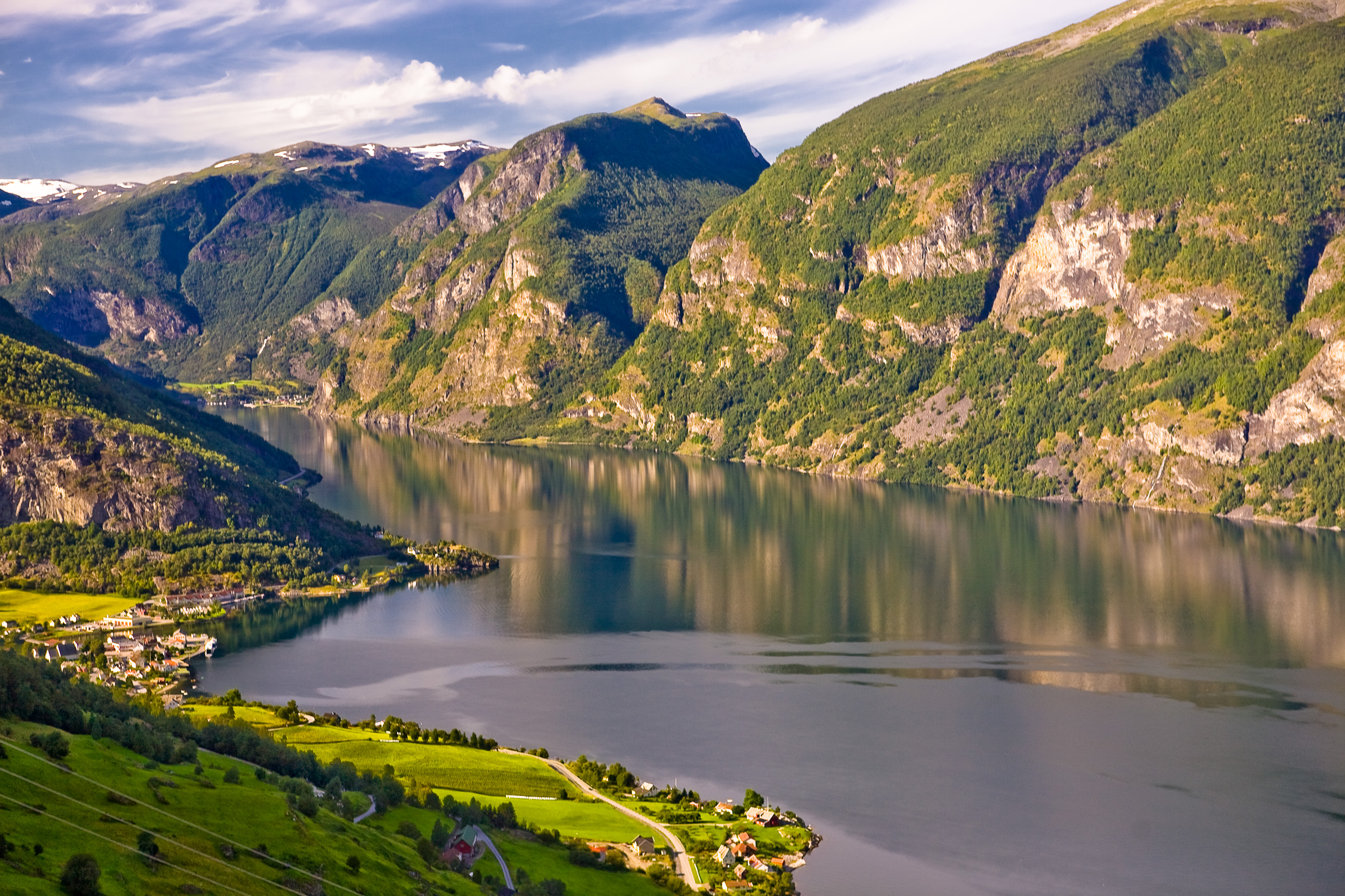 Indre del av Aurlandsfjorden frå Snøvegen, Flåm lengst inne, Aurlandsvangen til venstre.